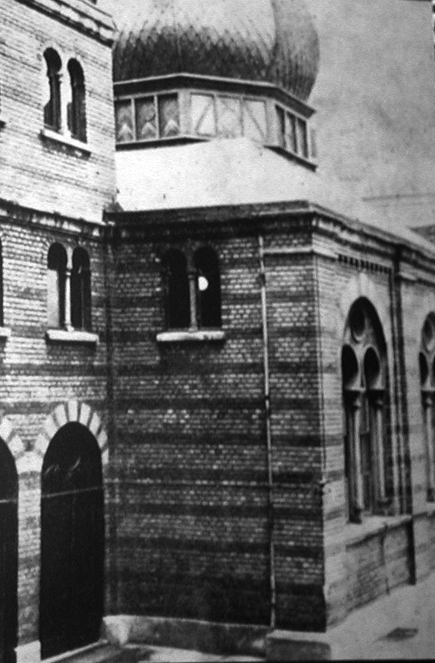 Synagoge Adass Jeschurun, St.-Apern-Straße. Dokumentation der Zeit zwischen 1933-1945 im NS-Dokumentationszentrum der Stadt Köln